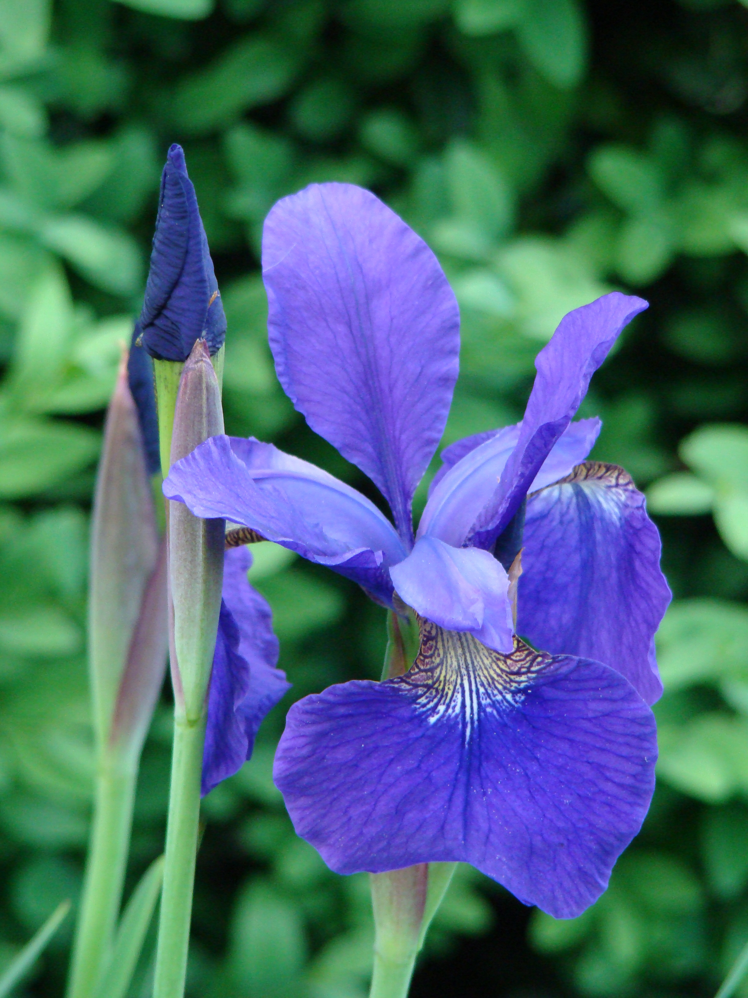 Iris Versicolore